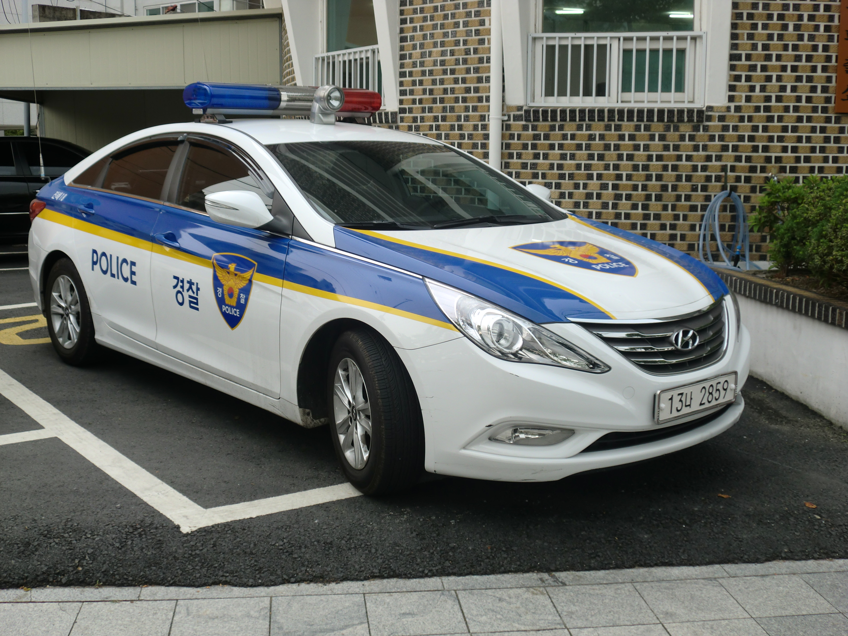 진해경찰서의 경찰차(충무파출소 내)